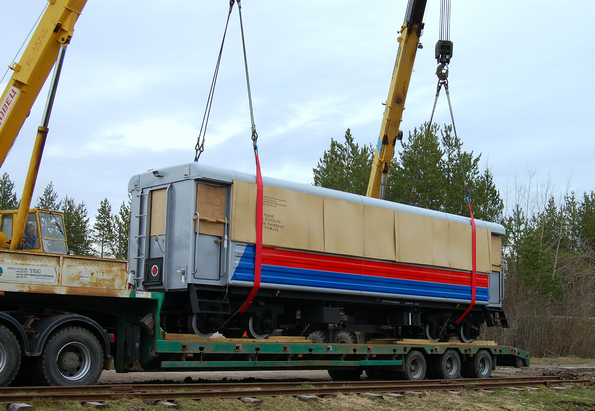 Кудемская УЖД